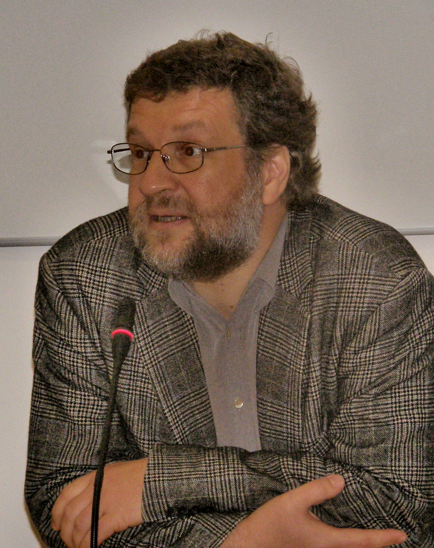 Tallinna Ülikooli rektor Rein Raud.